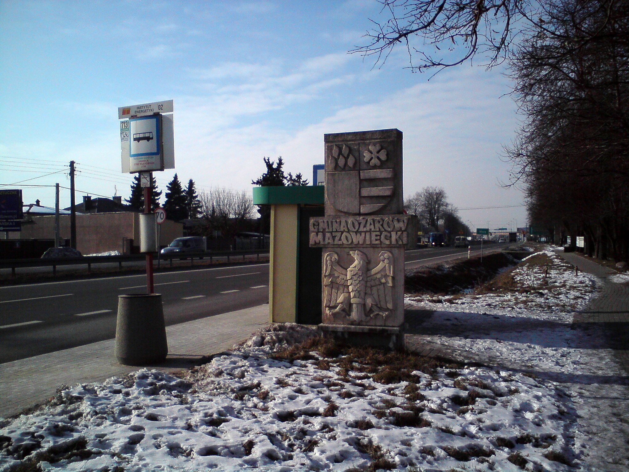 Godło gminy Ożarów Mazowiecki przy wyjeździe z Warszawy (ul. Połczyńska/Poznańska)